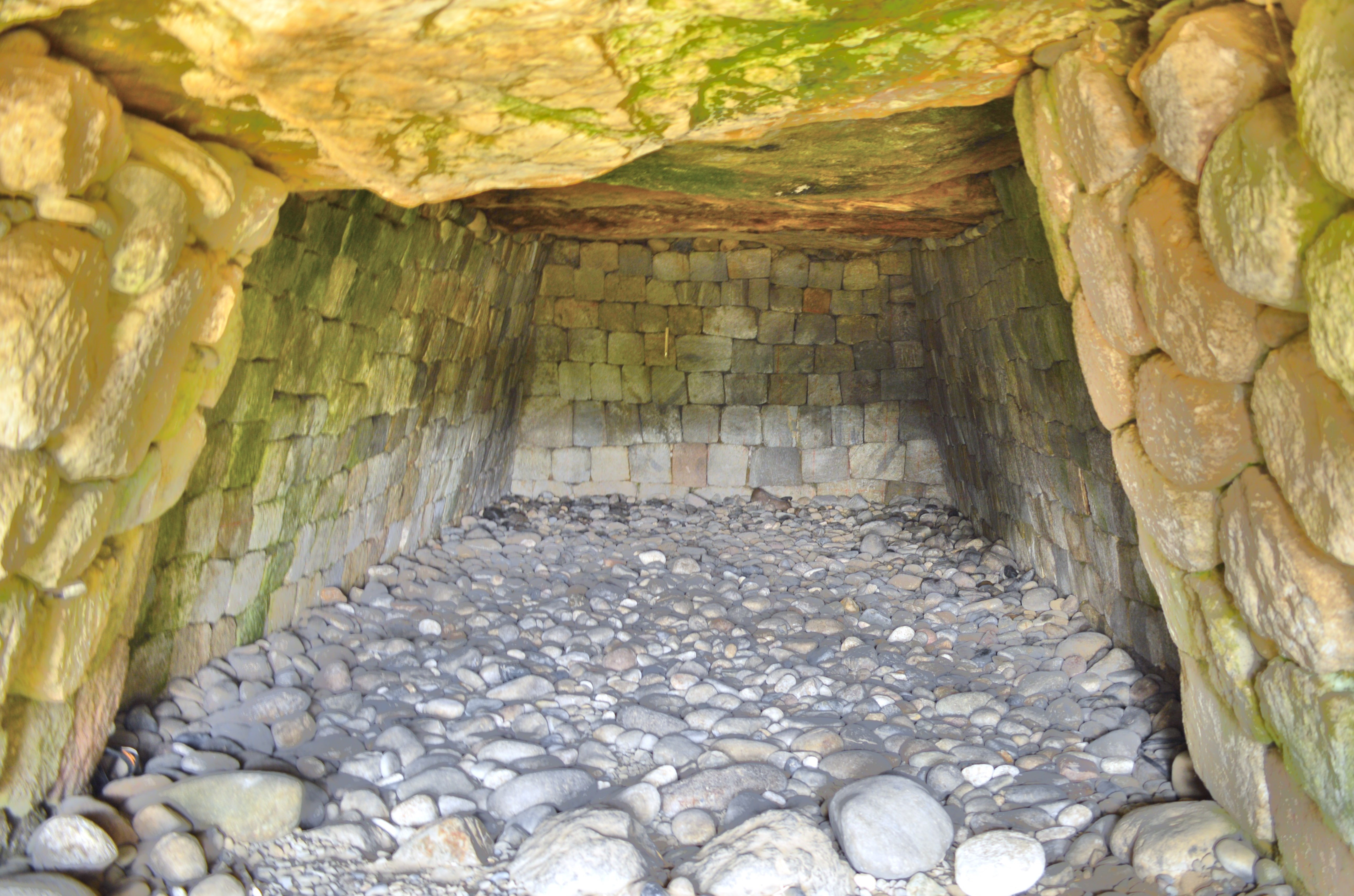 綿貫観音山古墳 石室